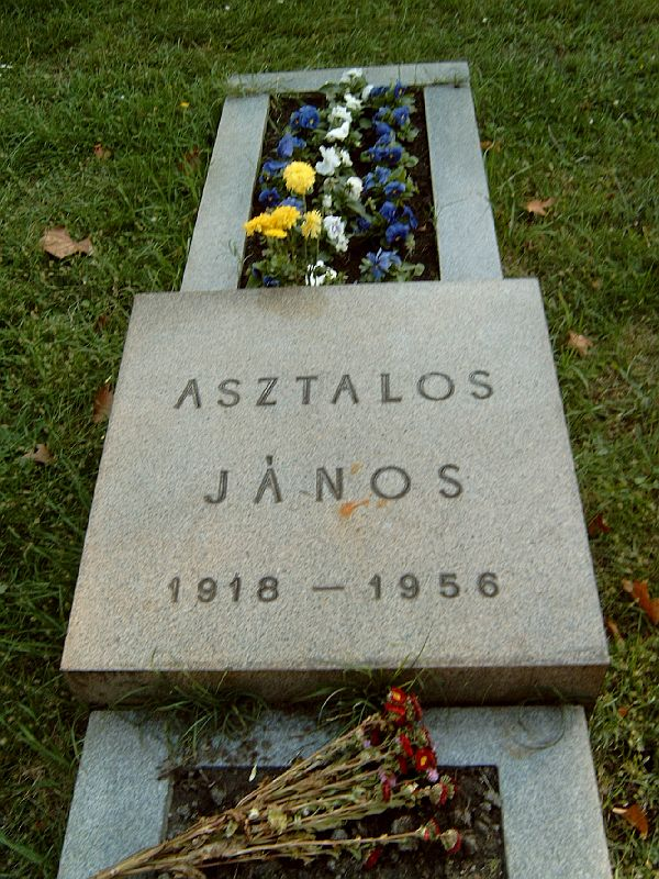 Asztalos János (Pozsony, 1918 - Budapest, 1956) 1932-től aranyművestanonc volt. 1937-ben tagja lett a Nemesfémipari Munkások Szakszervezetének és az MSZDP-nek. Bekapcsolódott a függetlenségi mozgalomba, emiatt 1942 májusában letartóztatták és másfél év szabadságvesztésre ítélték. Kiszabadulása után Nagykanizsára internálták. 1945-ben részt vett Nagykanizsán az MKP megalakításában, majd Zalaegerszegen végzett pártmunkát. 1956. október 23-tól az MDP Budapesti Bizottsága Köztársaság téri épületében lévő ÁVH-s egység egyik parancsnoka. Október 30-án, a pártház ostromakor a védelem egyik irányítója. Az épület elfoglalásakor a behatoló tömeg agyonlőtte. Kerepesi temető: Mm. J.6.